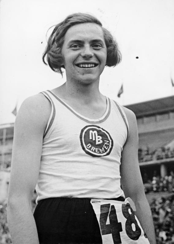 Berlin, Heinrich Ratjen alias "Dora Ratjen" Scherl: Deutsche Leichtathletikmeisterschaften 1937 im Olympia Stadion. Die Deutsche Meisterin 1937 Fr. Ratjen (Bremen) [Hochsprung] [Berlin, Olympiastadion.- Porträt "Dora Ratjen", eigentlich Heinrich Ratjen, Juli 1937] Abgebildete Personen: Ratjen, Heinrich: 1918-2008; Leichtathlet (unter der Namen Dora Ratjen), Deutschland